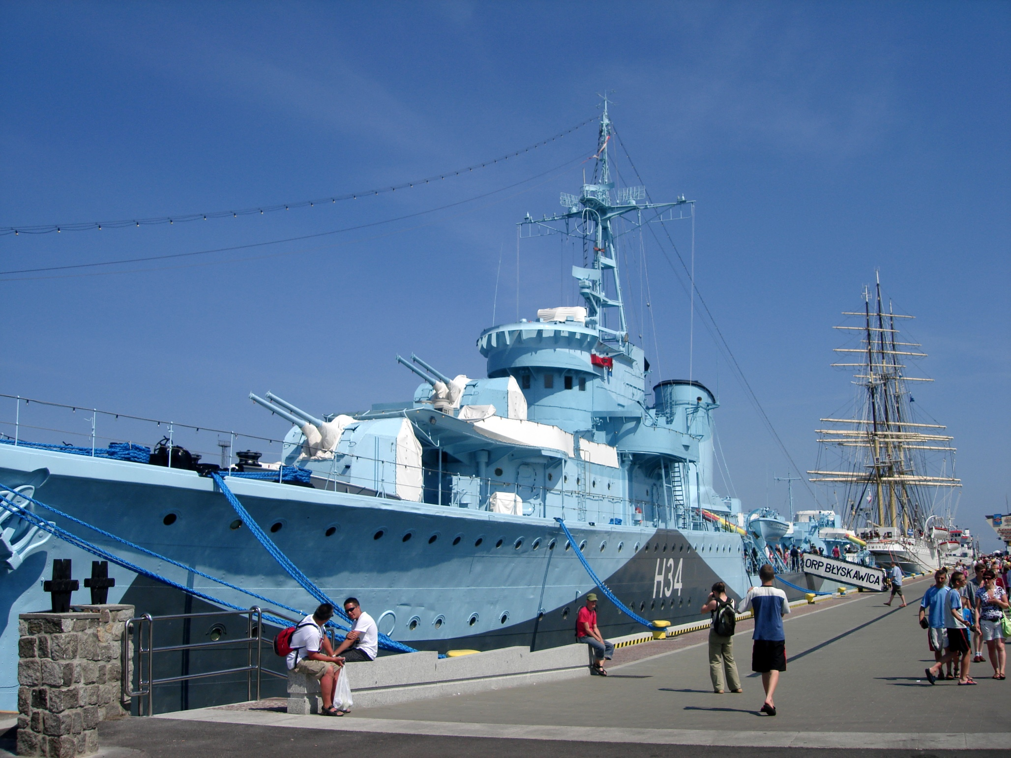 Gdynia, ORP Błyskawica (destroyer)